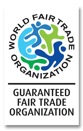 Allmänna logotypen för WFTO-produkter godkända av WFTO.